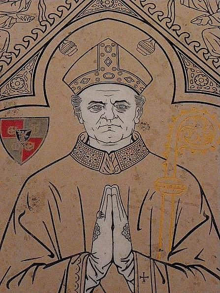 Dalle funéraire de Mgr Abel Anastase Germain en la chapelle de la Circate de la cathédrale Notre-Dame de Coutances (50).